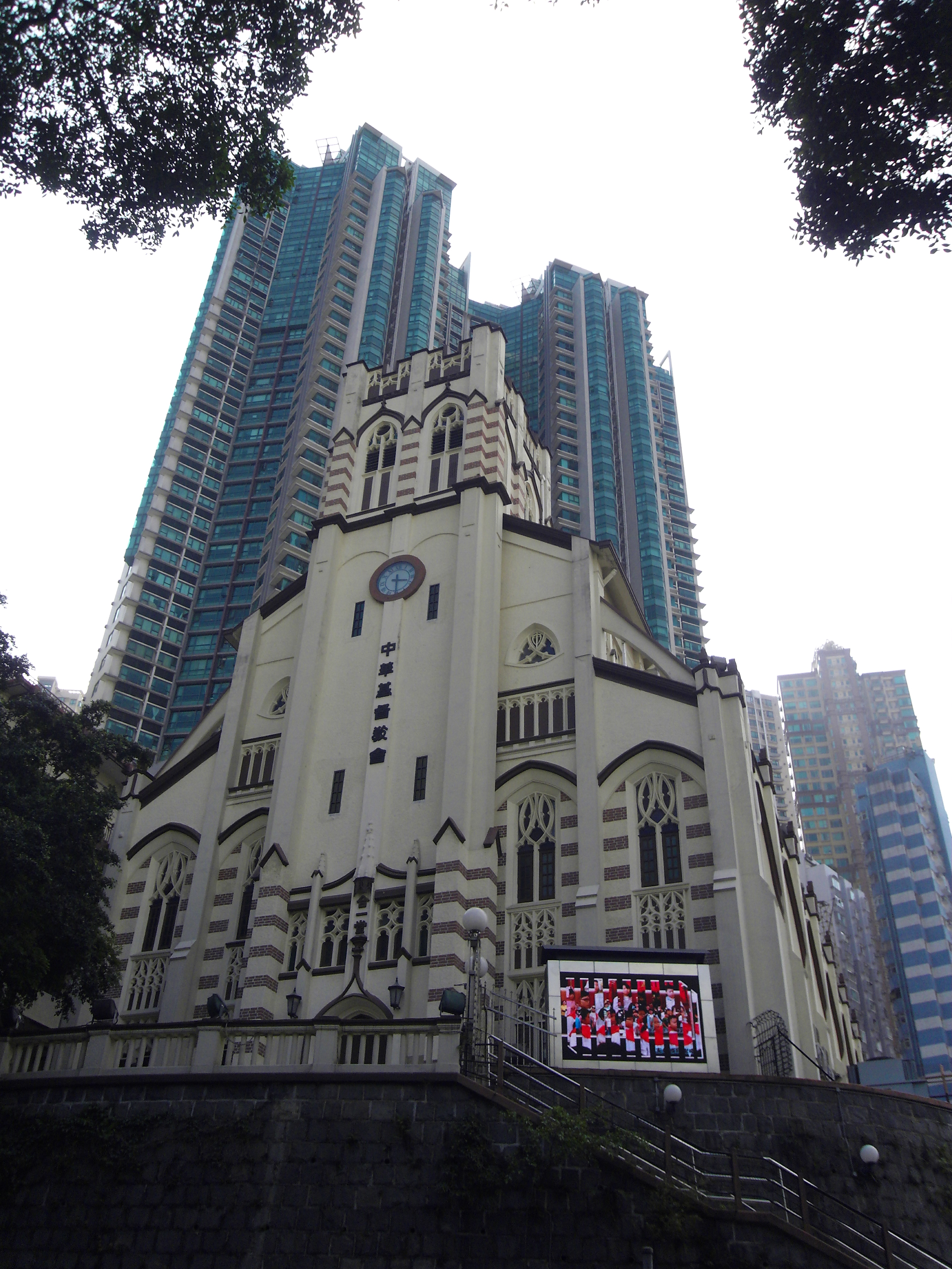 中文（香港）: 中華基督教會合一堂(香港堂),般含道,香港